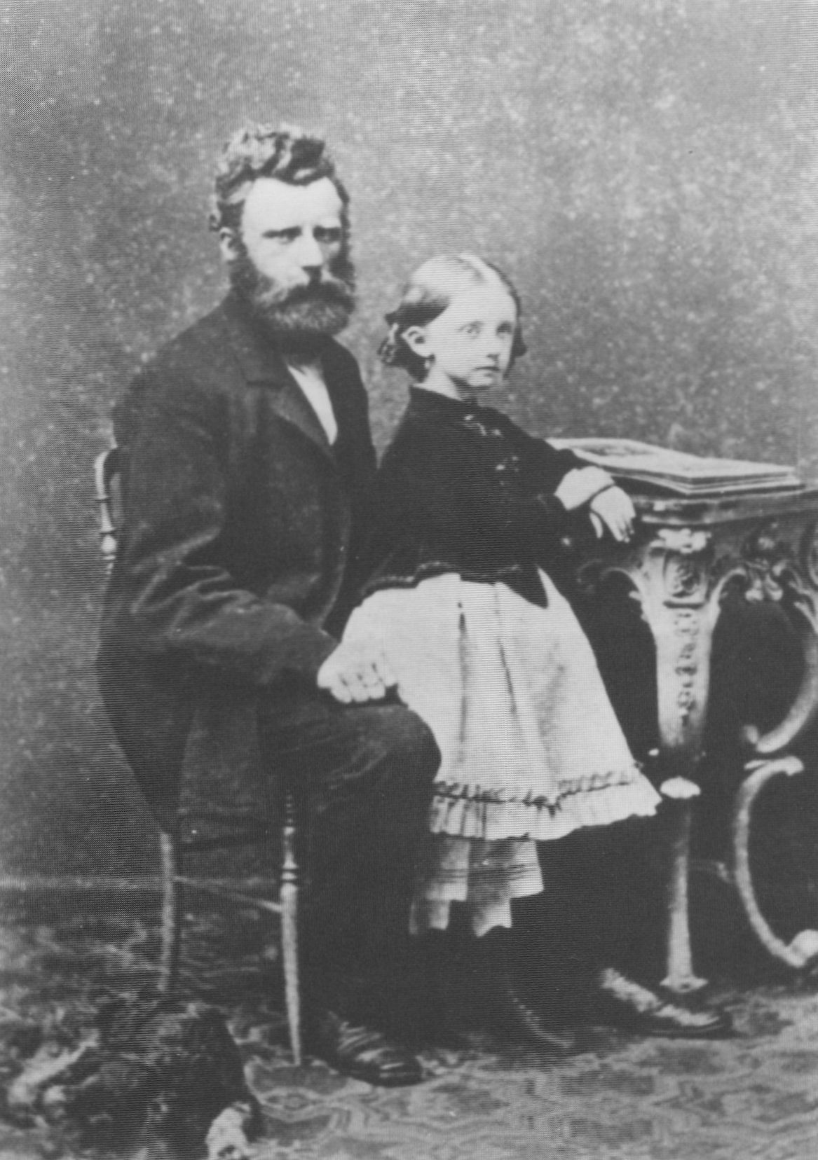 Hans Peder Rasmussen und Tochter Anna Petersine Frederikke